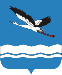 Герб городского поселения "Город Амурск" (Хабаровский край)